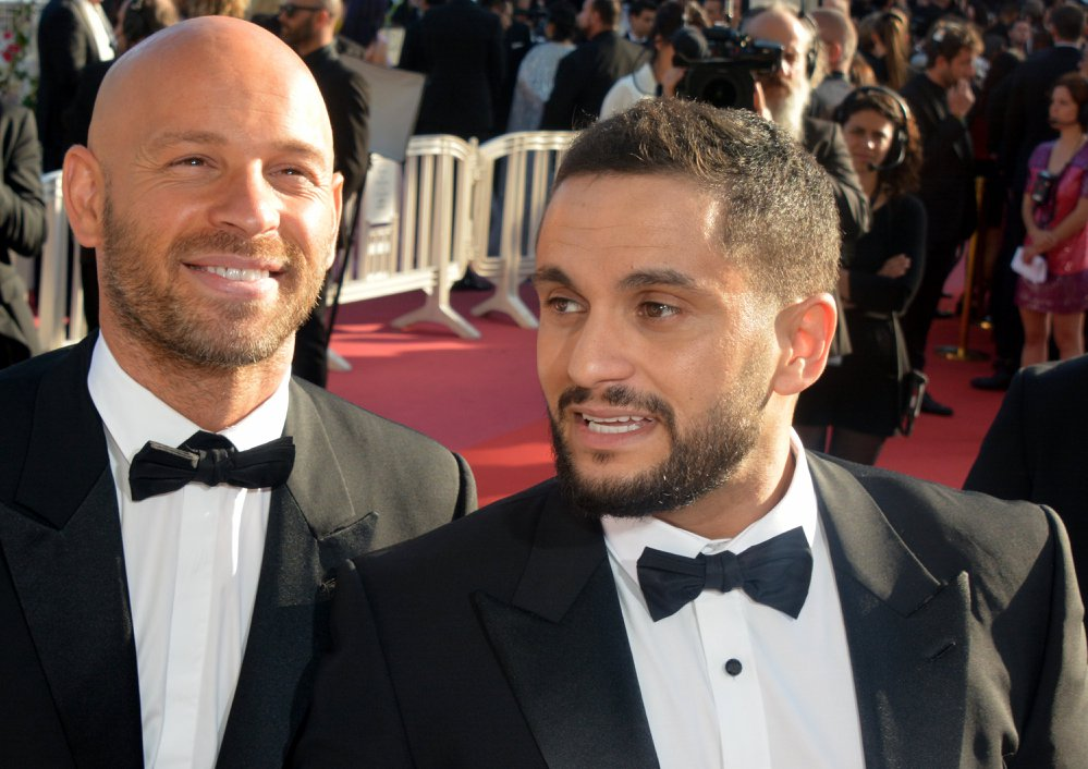 Franck Gastambide et Malik Bentalha au festival de Cannes